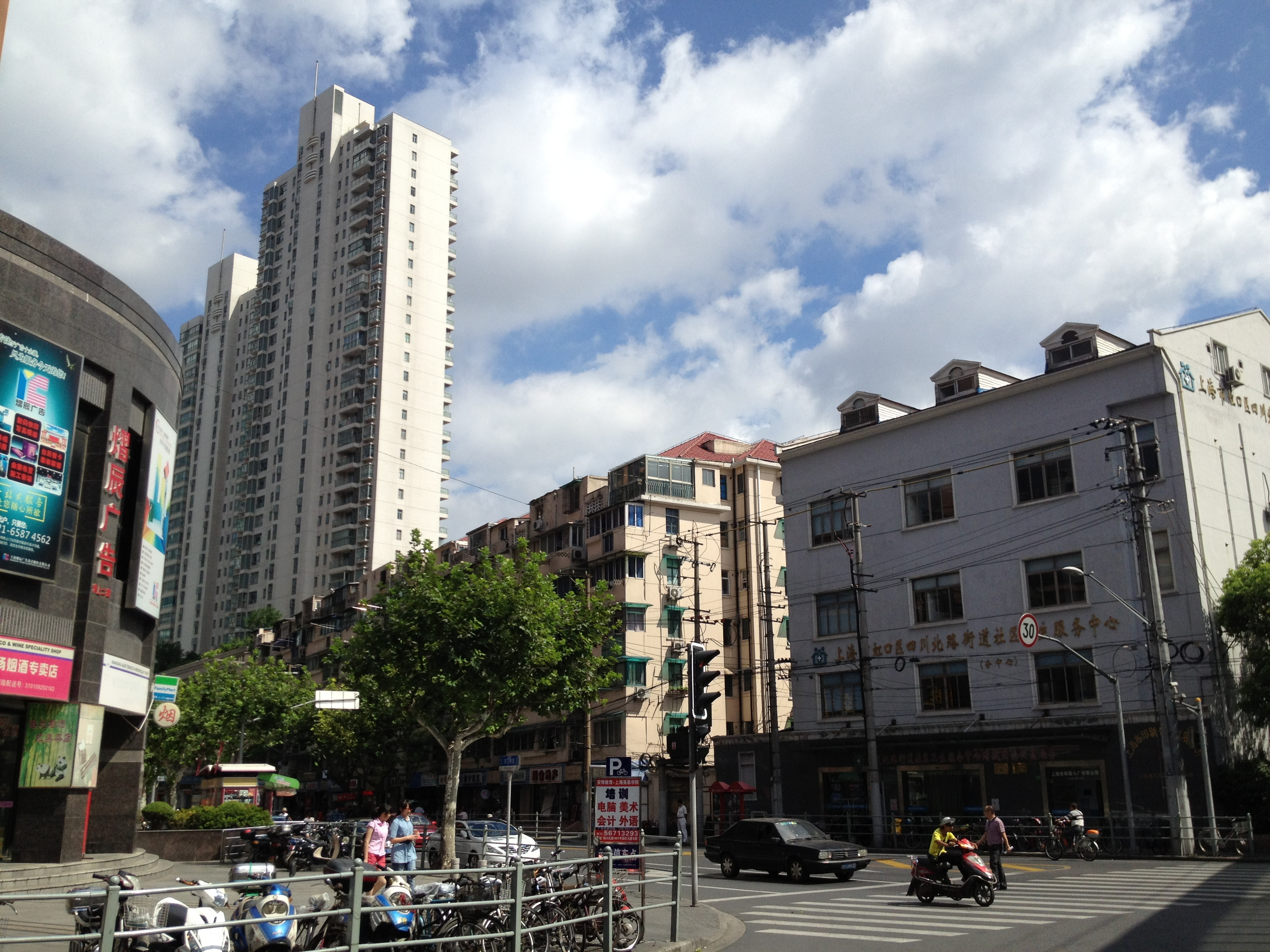 四川北路街道东宝兴路宝源路路口，视角背后为3号线东宝兴路站